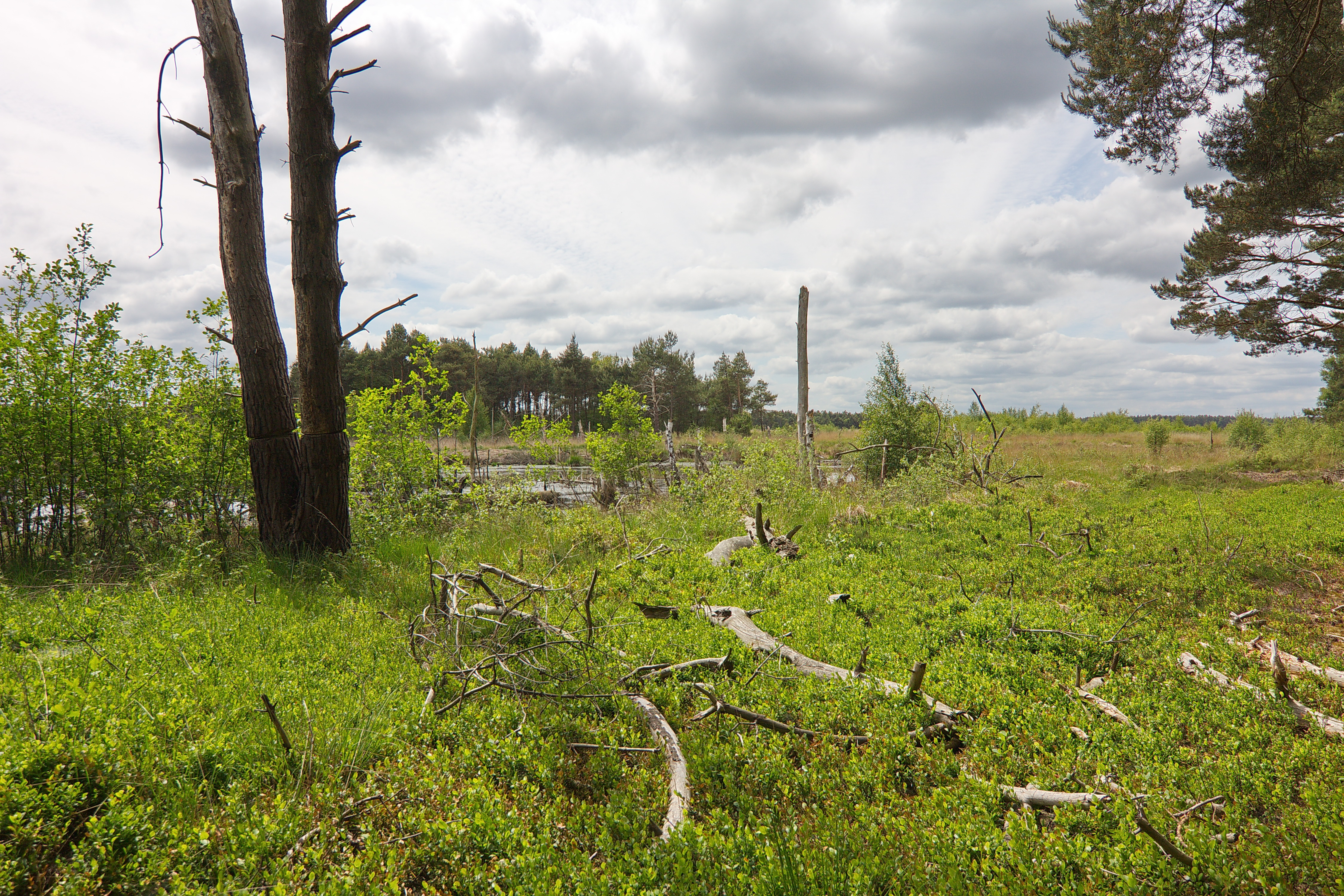 Naturschutzgebiet Rehburger Moor in Niedersachsen, Deutschland